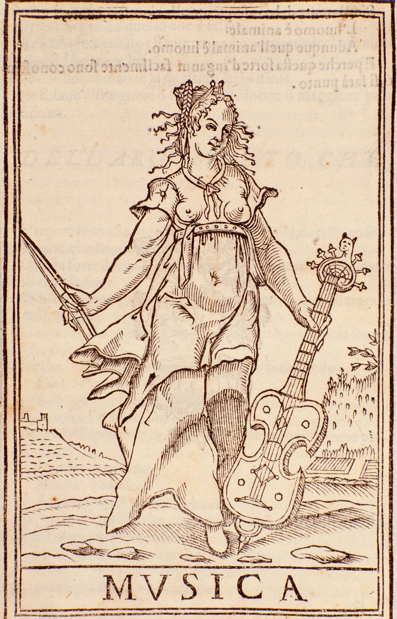 Xilogravura, século XVI, artista desconhecido (anônimo), mostrando a MVSICA (música) segurando uma antiga Viola da Gamba.